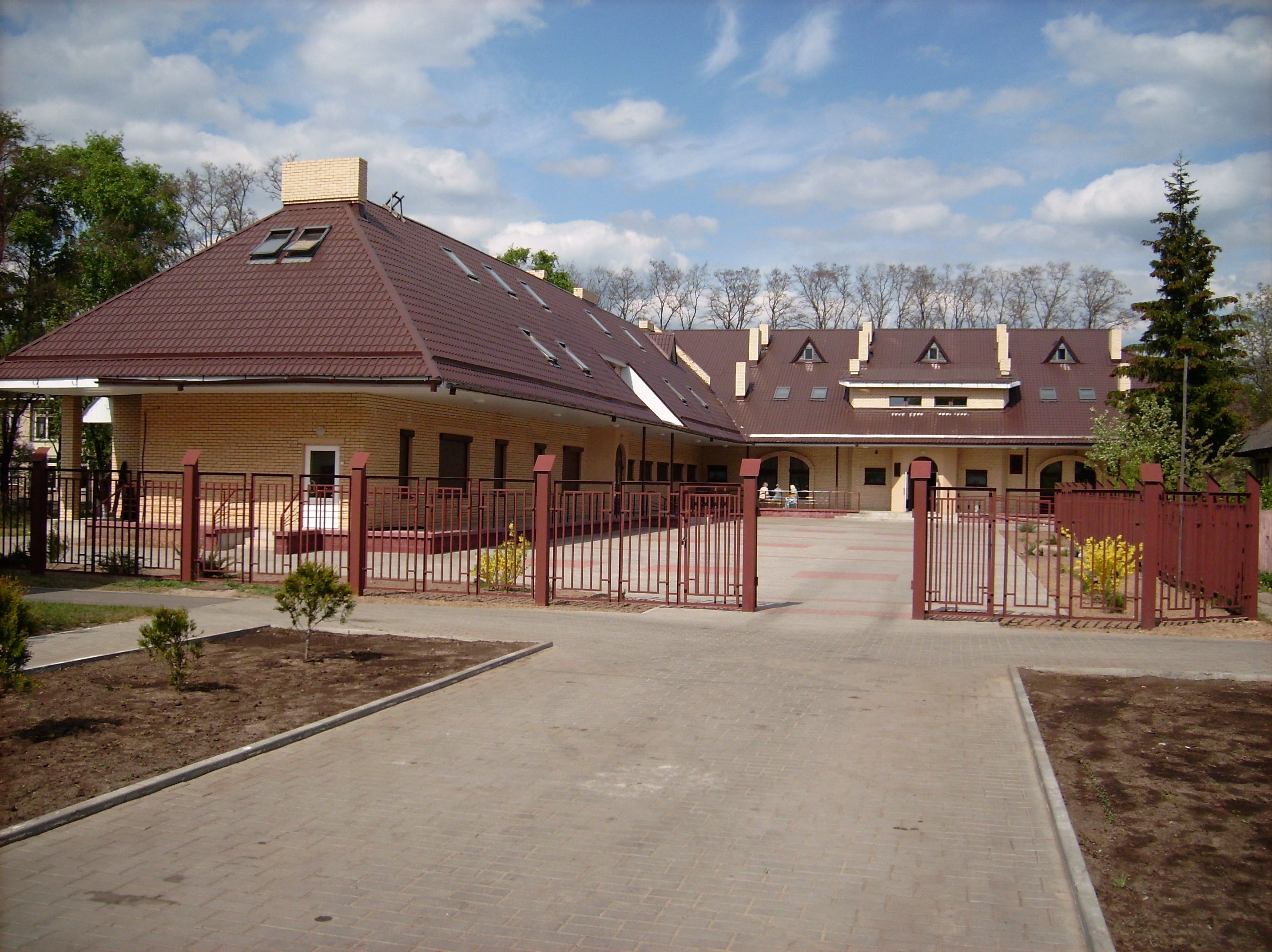 Историко-краеведческий музей города Светлогорска Гомельской области